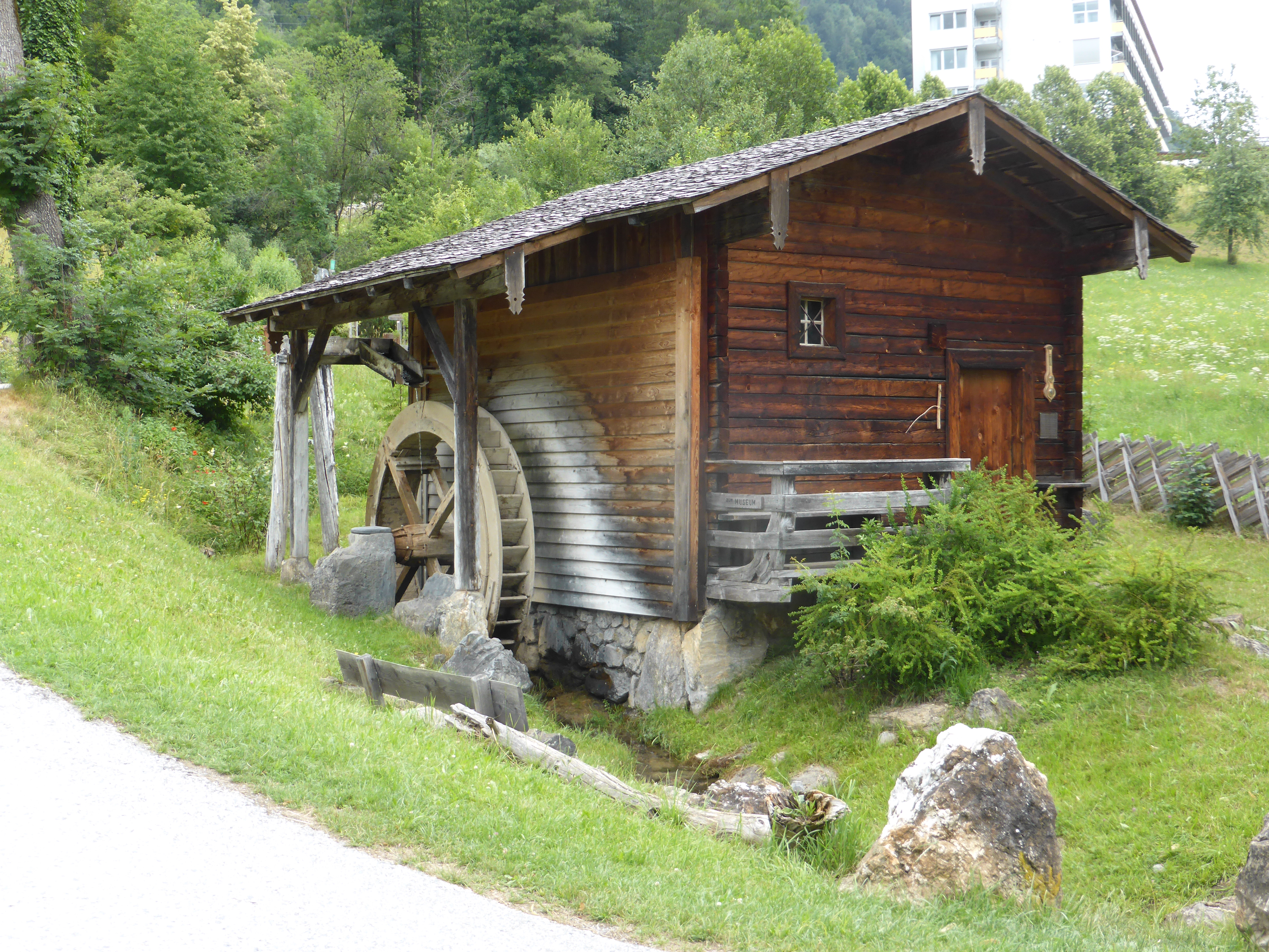 Bauernhaus, Heimatmuseum; Wallnergut